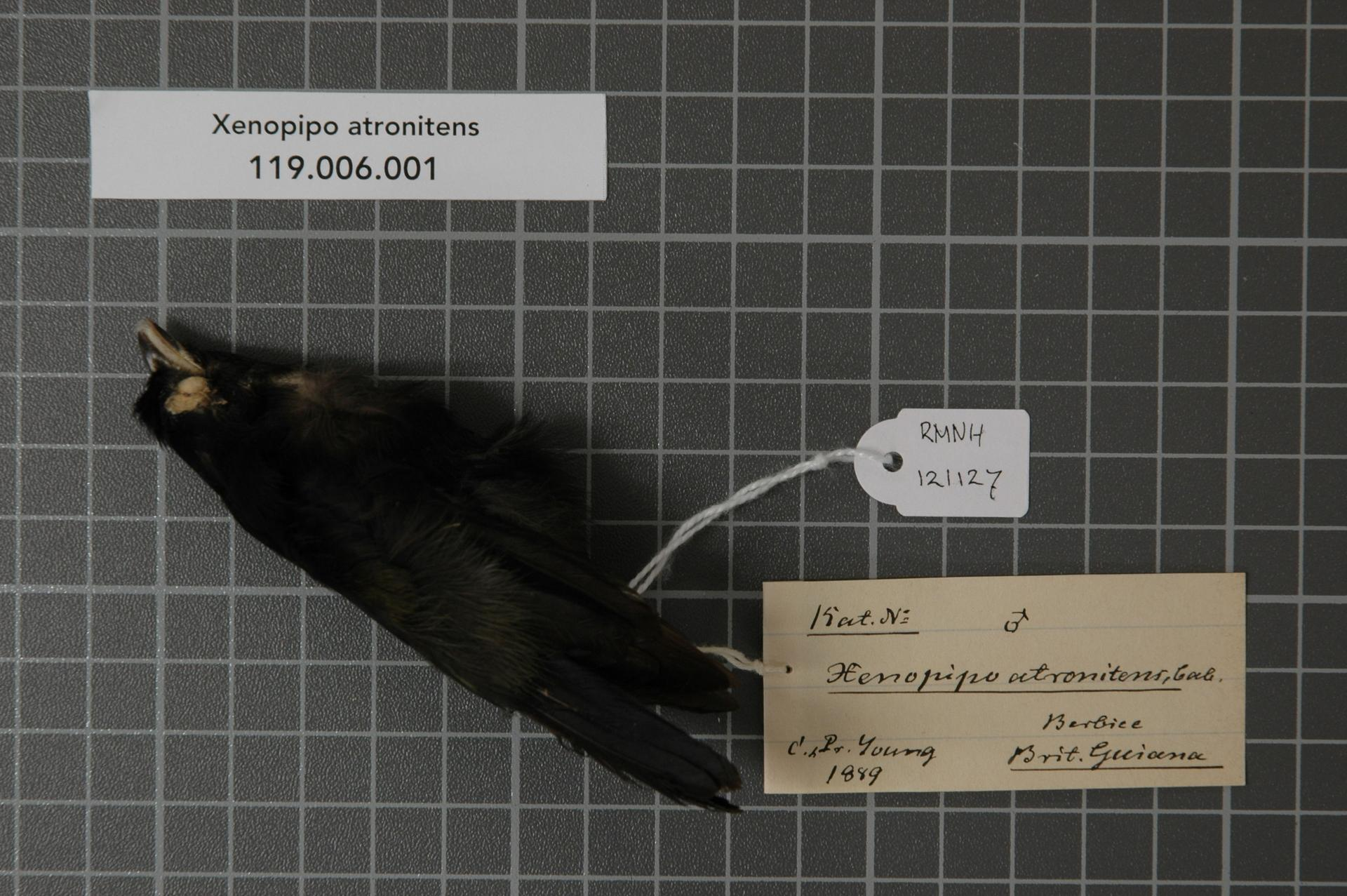 Xenopipo atronitens Cabanis, 1847